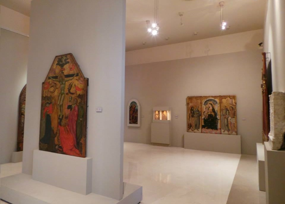 Sezione rinascimentale museo diocesano